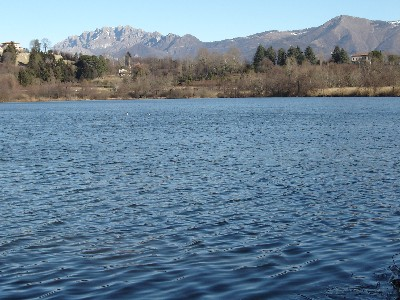 Lago di Sartirana, sullo sfondo il Resegone. Autore Robbypeg rinuncia ai diritti sull'opera e la concede al pubblico dominio.